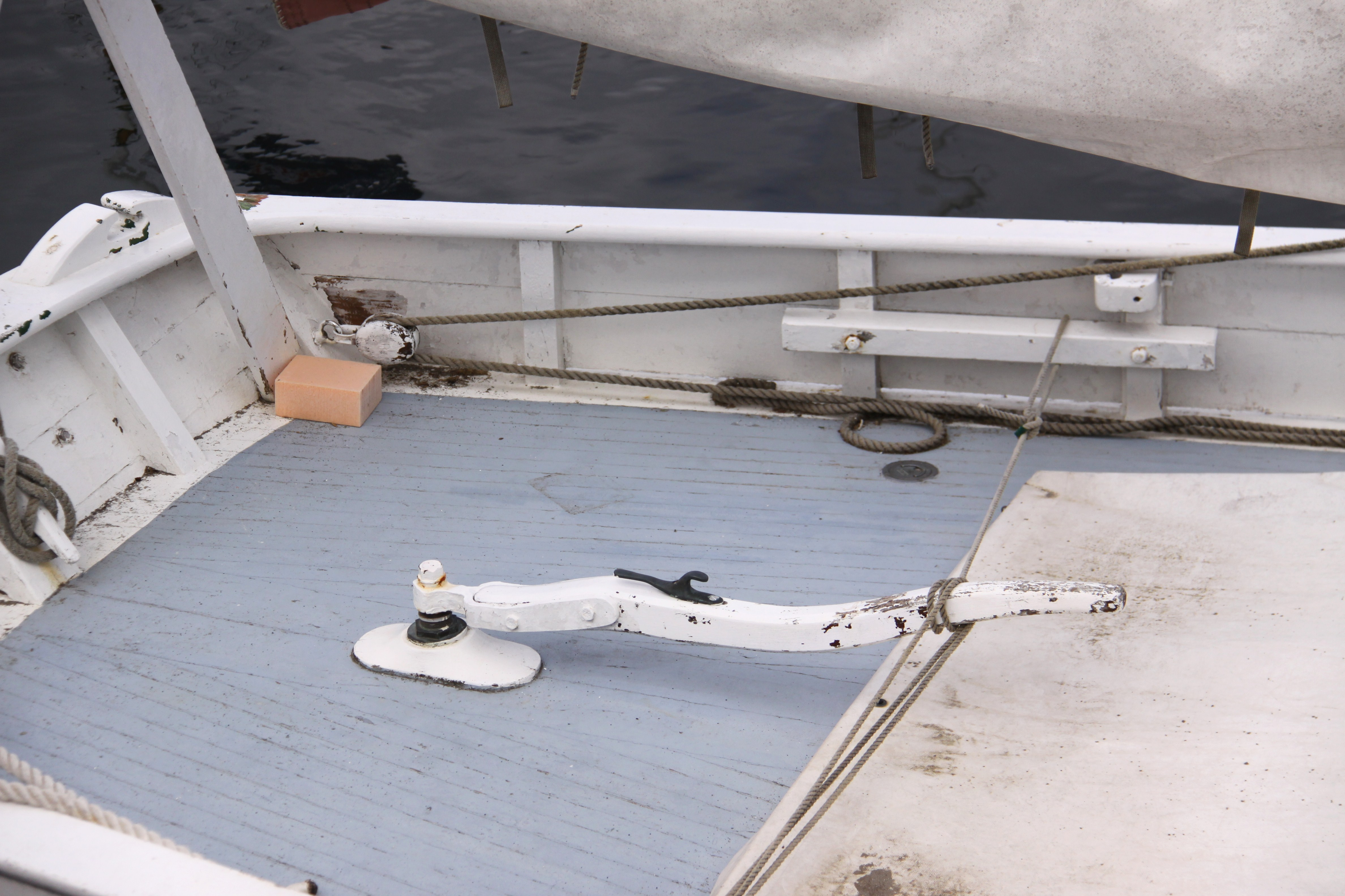 Vue de la barre du sloop ostréicole « Petit Normandie ». Ce bateau de travail a été construit en 1933. Il mesure 11 mètres de long (hors tout). Quartier maritime: Marennes. La Rochelle, Charente Maritime, France.